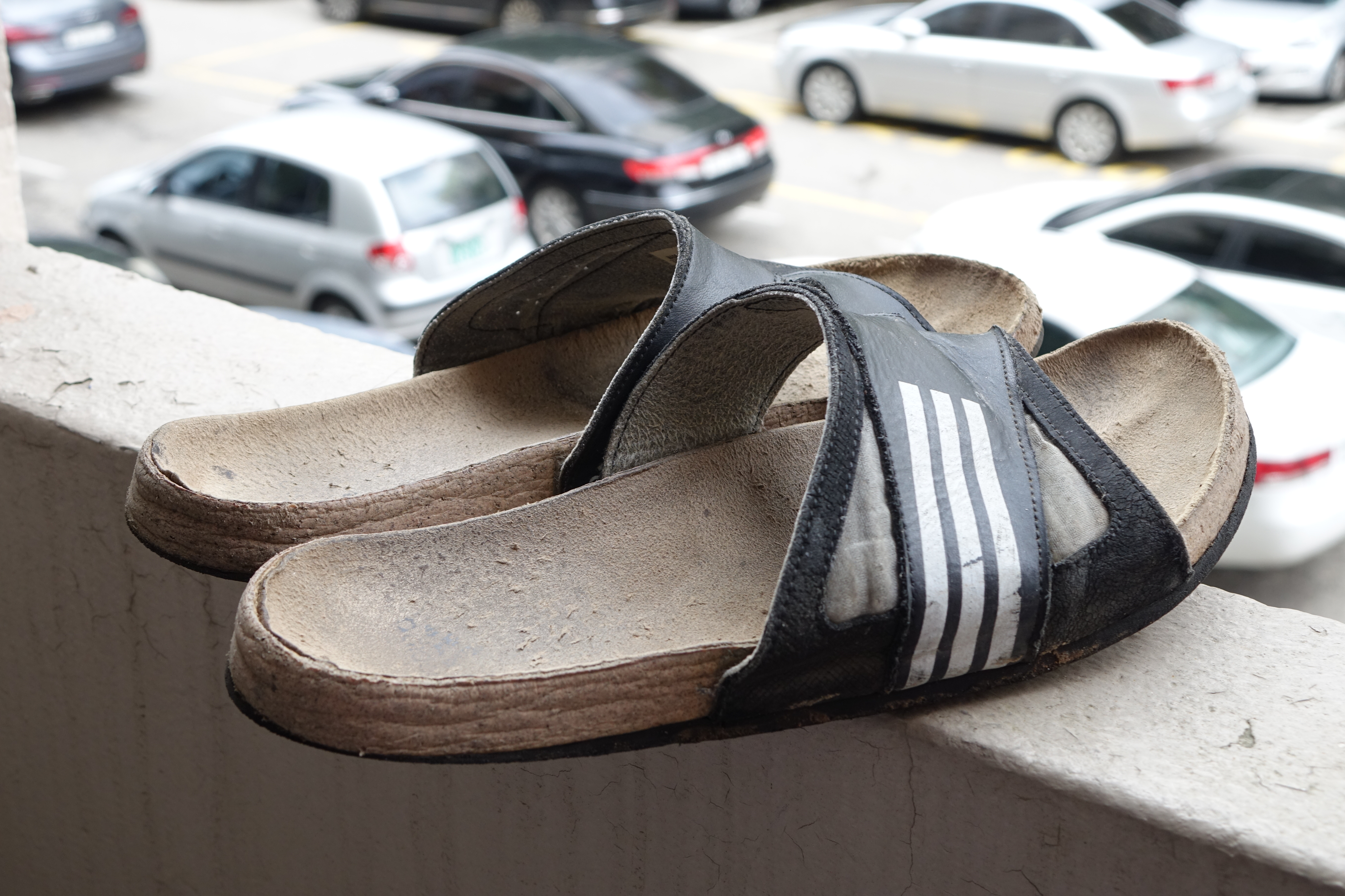 본인은 사진의 저작권자로서, 이 저작물을 'CC0 1.0 보편적 퍼블릭 도메인 기증' 저작권으로 배포합니다. 사진에 대해 궁금하신 점이나 원본 파일(ARW)을 원하시는 분은 010-7221-7119로 연락주세요. 감사합니다. 2015년 8월 10일. 최광모.